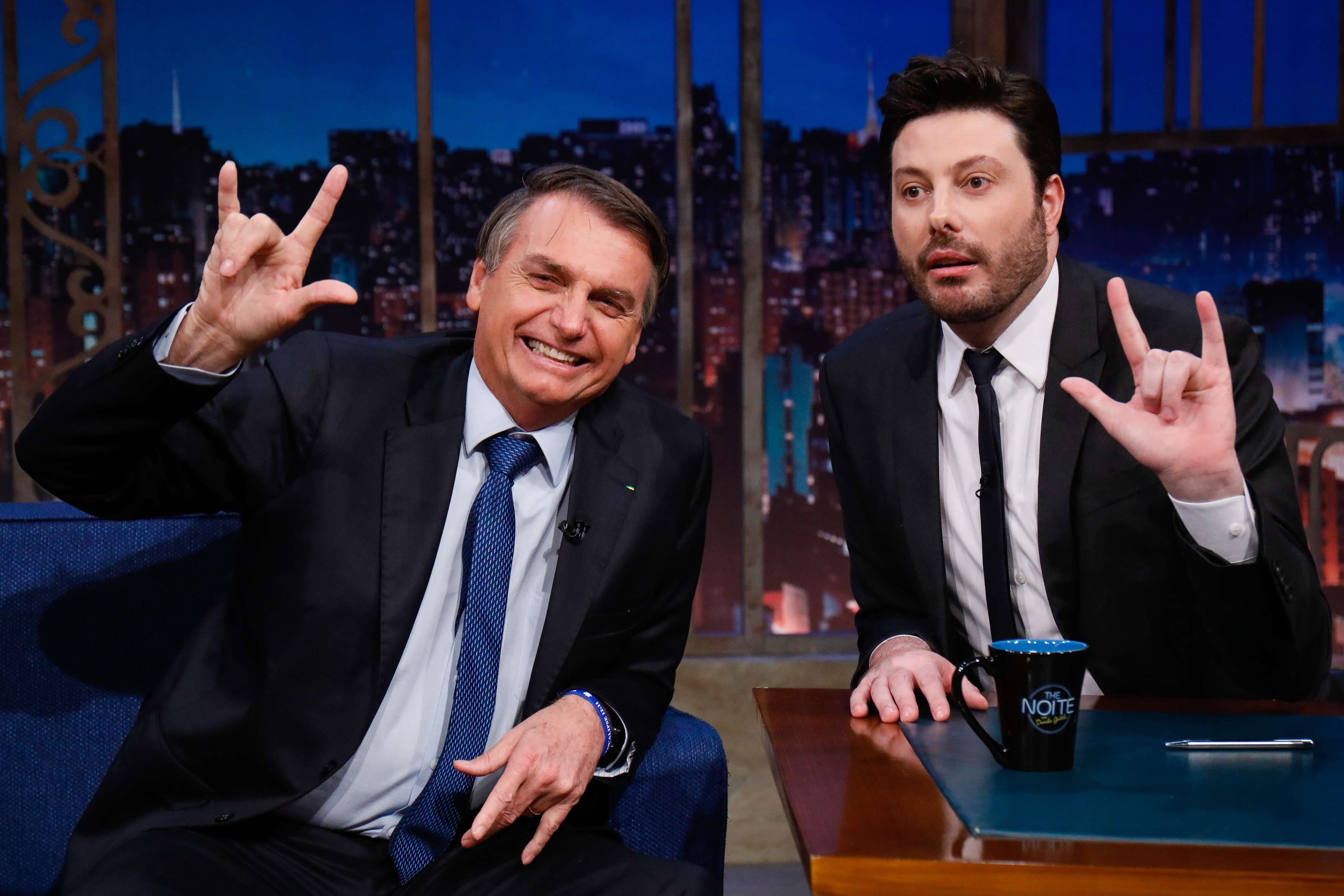 (São Paulo - SP, 30/05/2019) Entrevista ao Apresentador Danilo Gentili para o Programa The Noite do SBT, gravada dia 29 de maio. Foto: Alan Santos/PR